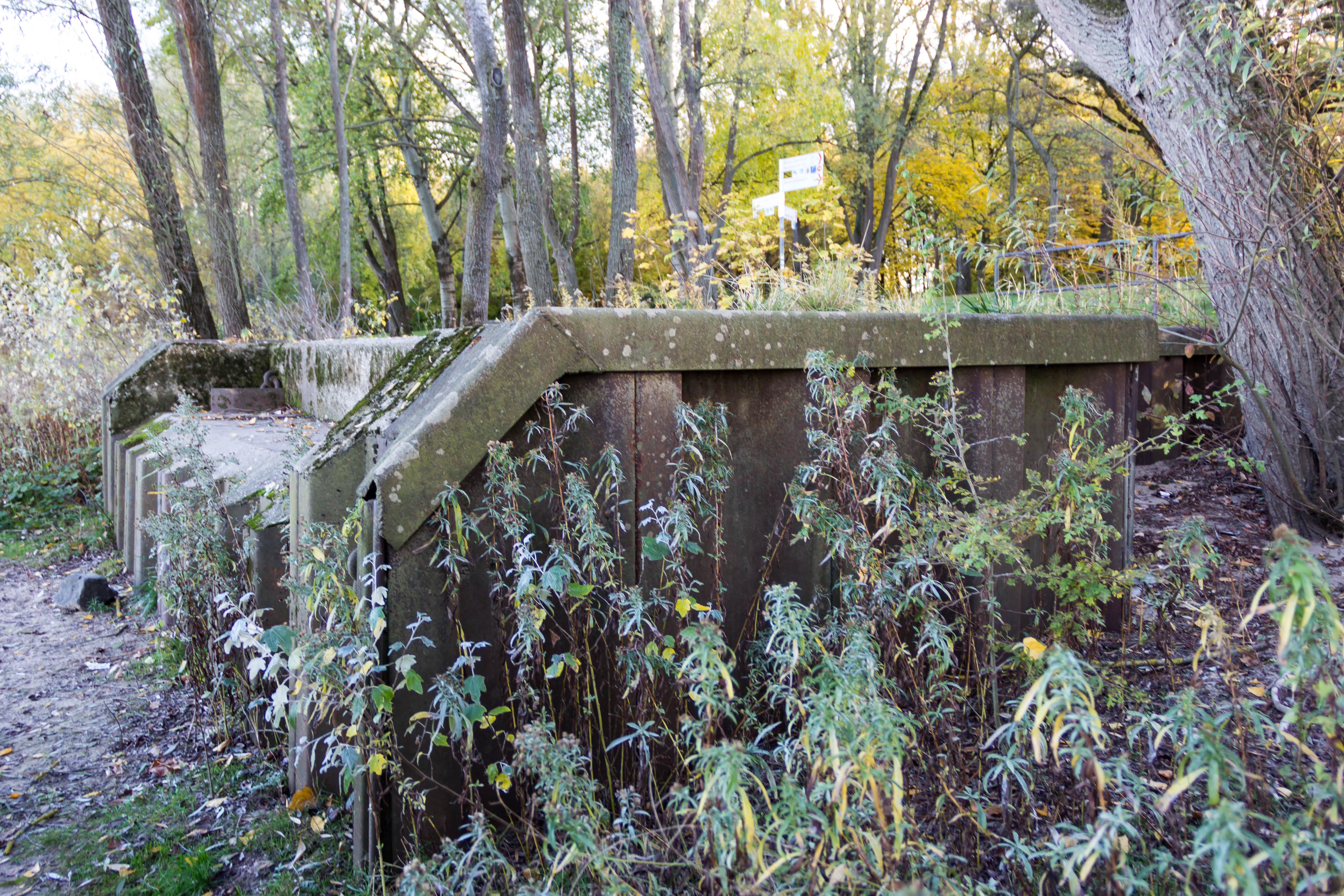 Die ehemalige Anlegestelle des Restaurantschiffs Rüdesheim in der Rheinaue (Bonn)Bonner Rheinaue.Das Schiff, dass zu der Zeit für die Köln-Düsseldorfer Deutsche Rheinschiffahrt (KD) im Einsatz war, war hier während der Bundesgartenschau 1979 für den Zeitraum vom 10. April bis zum 25. Oktober fest verankert. Die Rüdesheim ist heute ein Party- und Veranstaltungsschiff der Nederlandse Raderstoomboot Maatschappij und fährt unter dem Namen De Majesteit.